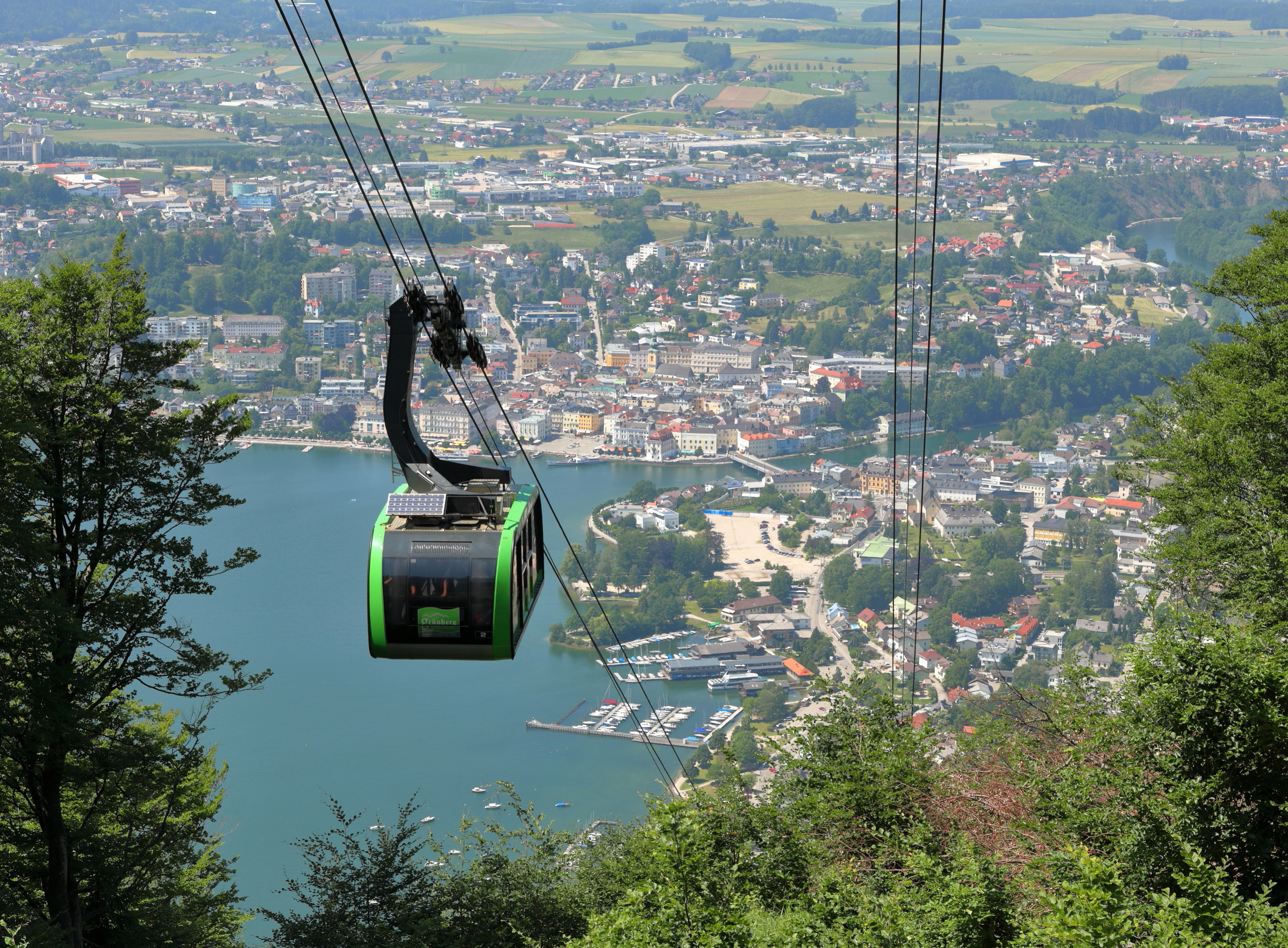 Blick von der Grünberg-Seilbahntrasse auf des Zentrum der oberösterreichischen Stadt Gmunden.Die ursprüngliche Seilbahn wurde 1957 errichtet und war bis 2010 in Betrieb. Die neue, eine Pendelbahn, wurde 14. Juni 2014 eröffnet und hat eine Kapazität von bis zu rund 600 Personen/Stunde.